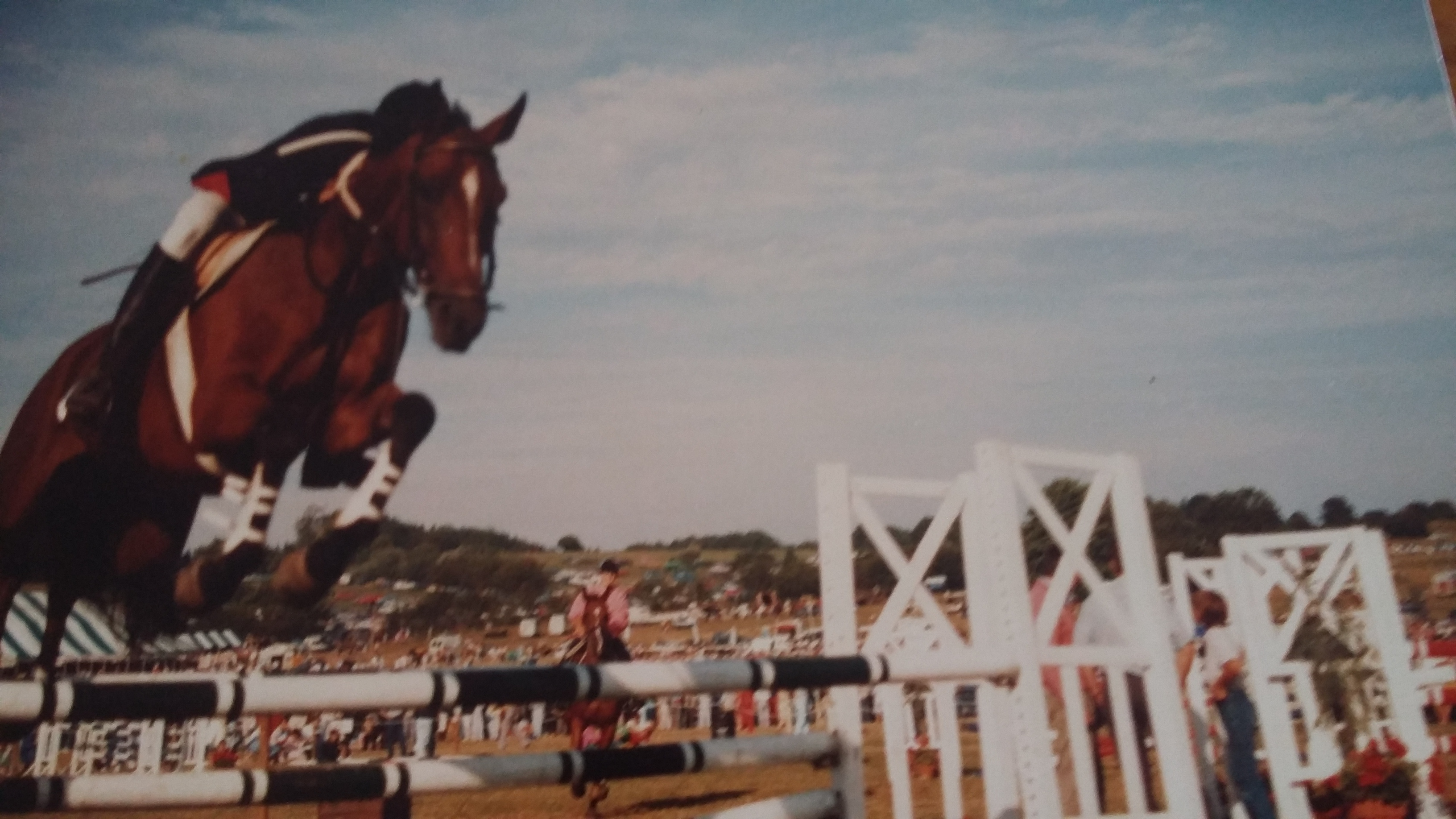 CSO PMB et Au jour le jour